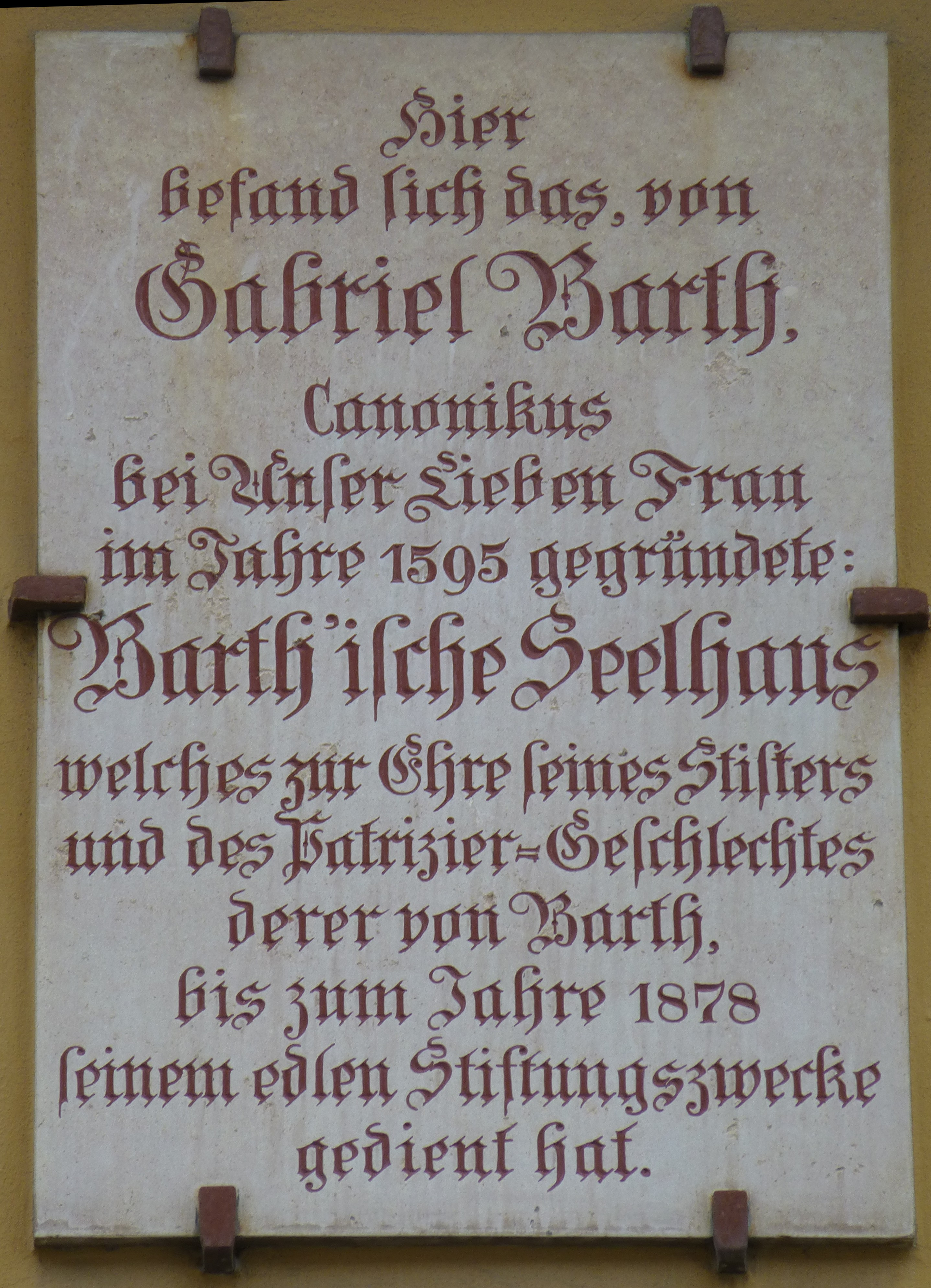 Gedenktafel an das Barth'ische Seelhaus in München, heute Herzogspitalstraße 5